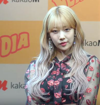 20일 오후 서울시 도봉구 창동 플랫폼 창동 61에서 다이아(유니스, 기희현, 제니, 정채연, 예빈, 은채, 주은, 솜이)의 다섯 번째 미니 앨범 'NEWTRO' 발매기념 쇼케이스가 열려 다이아가 멤버 개별 포토타임을 갖고 있다.